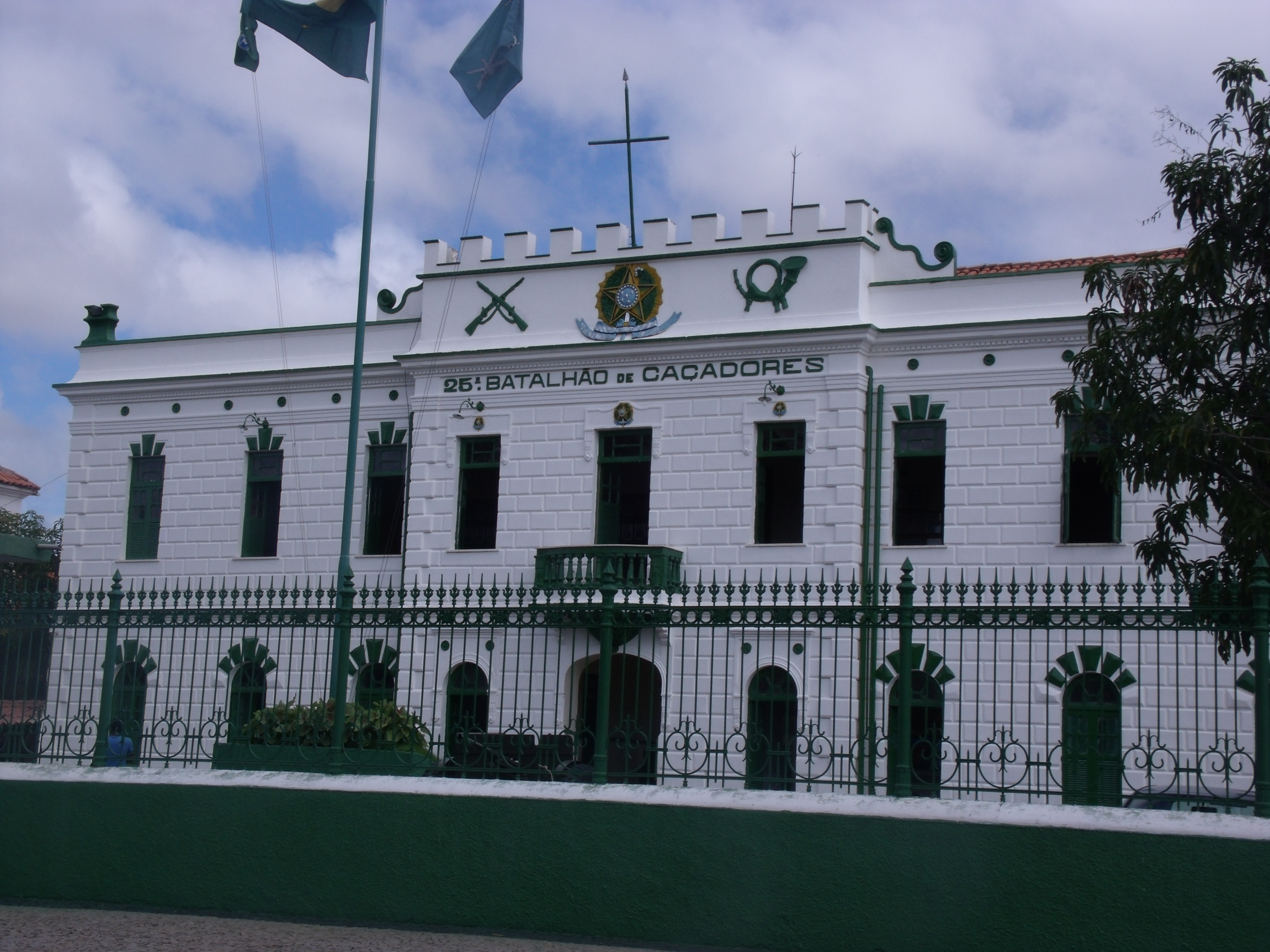 Palacete do 25º Batalhão de Caçadores do Exército Brasileiro, em Teresina.